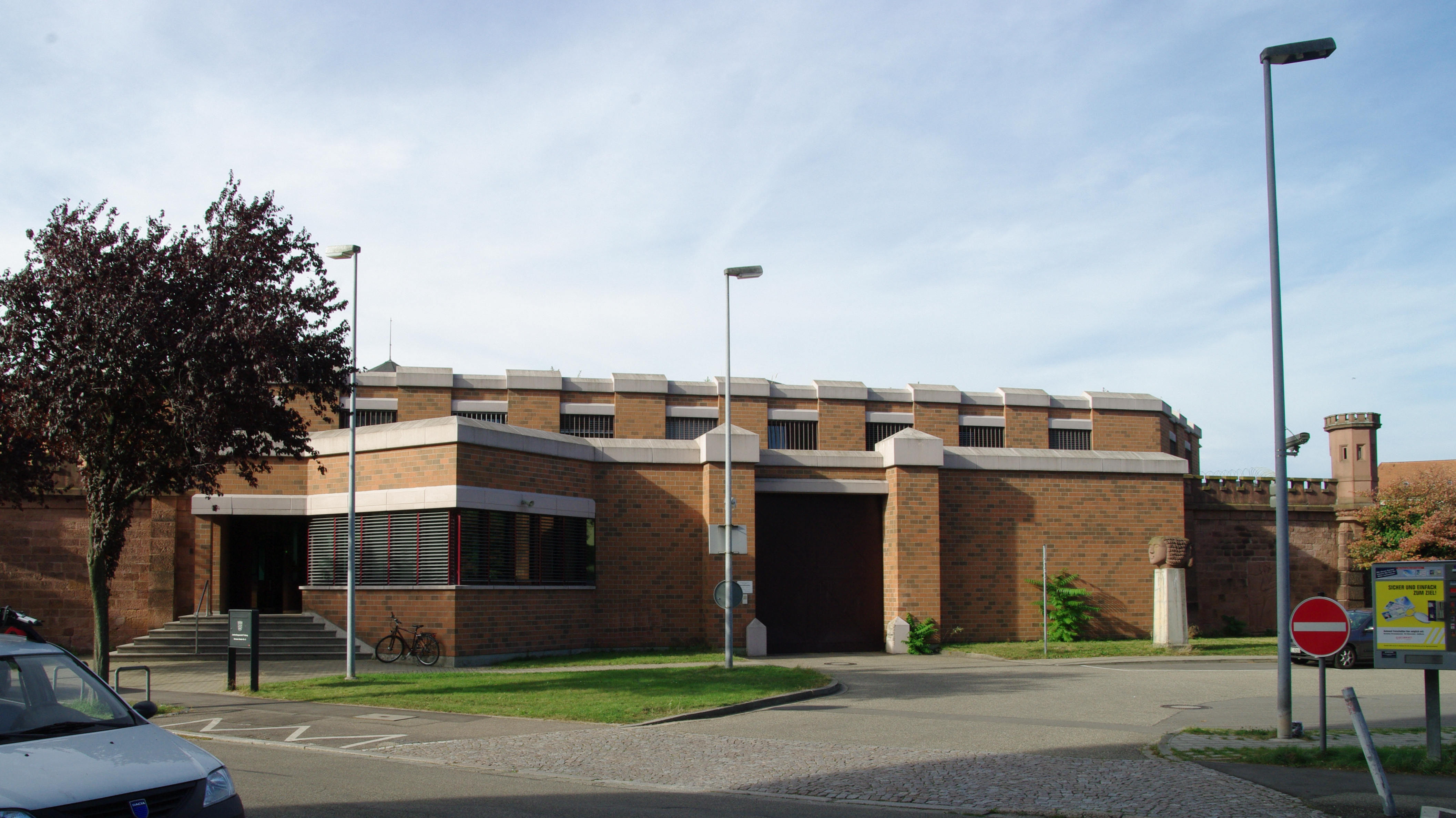 Die Justizvollzugsanstalt